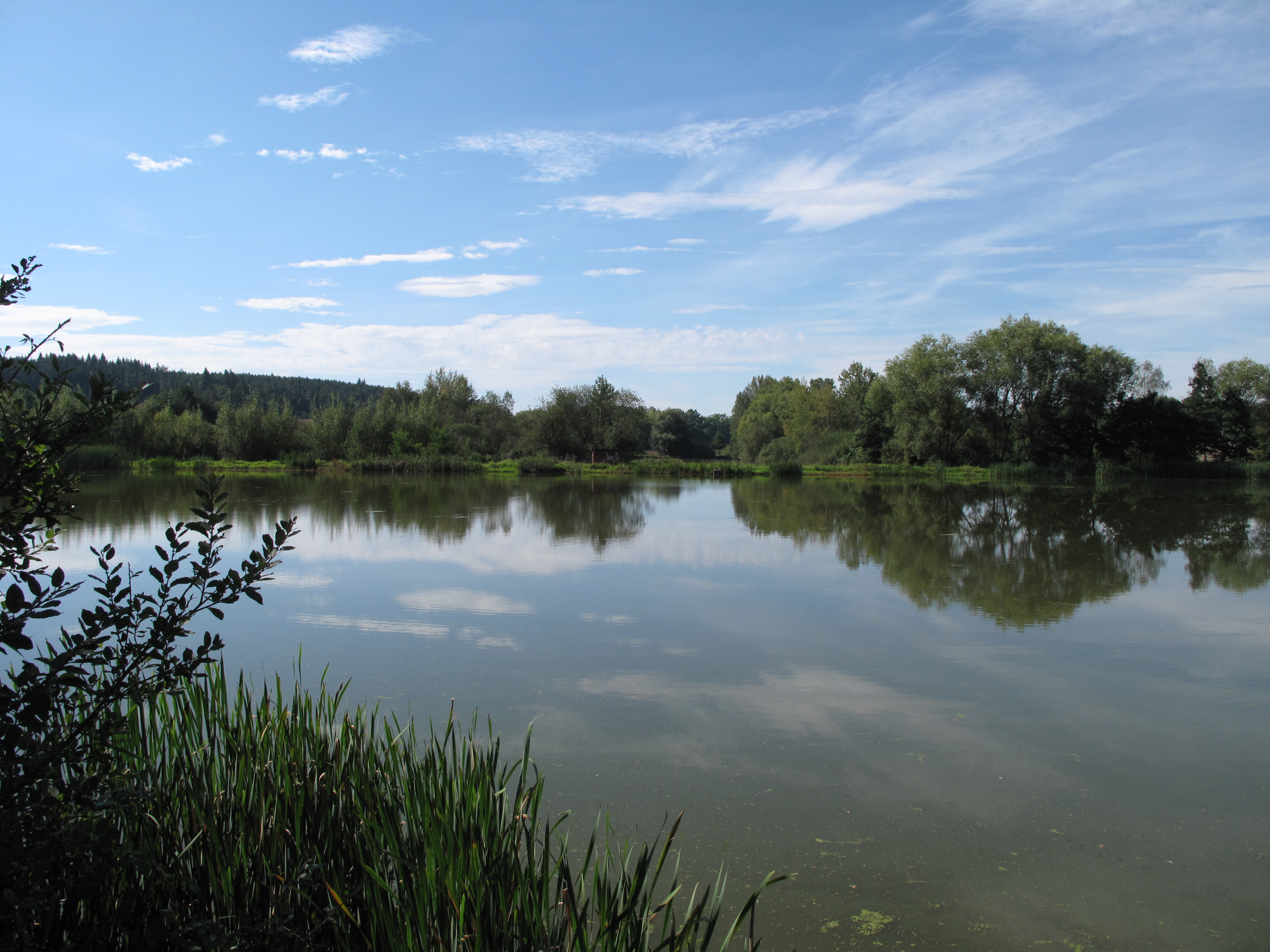 Nesvorný. Okres Písek, Česká republika.